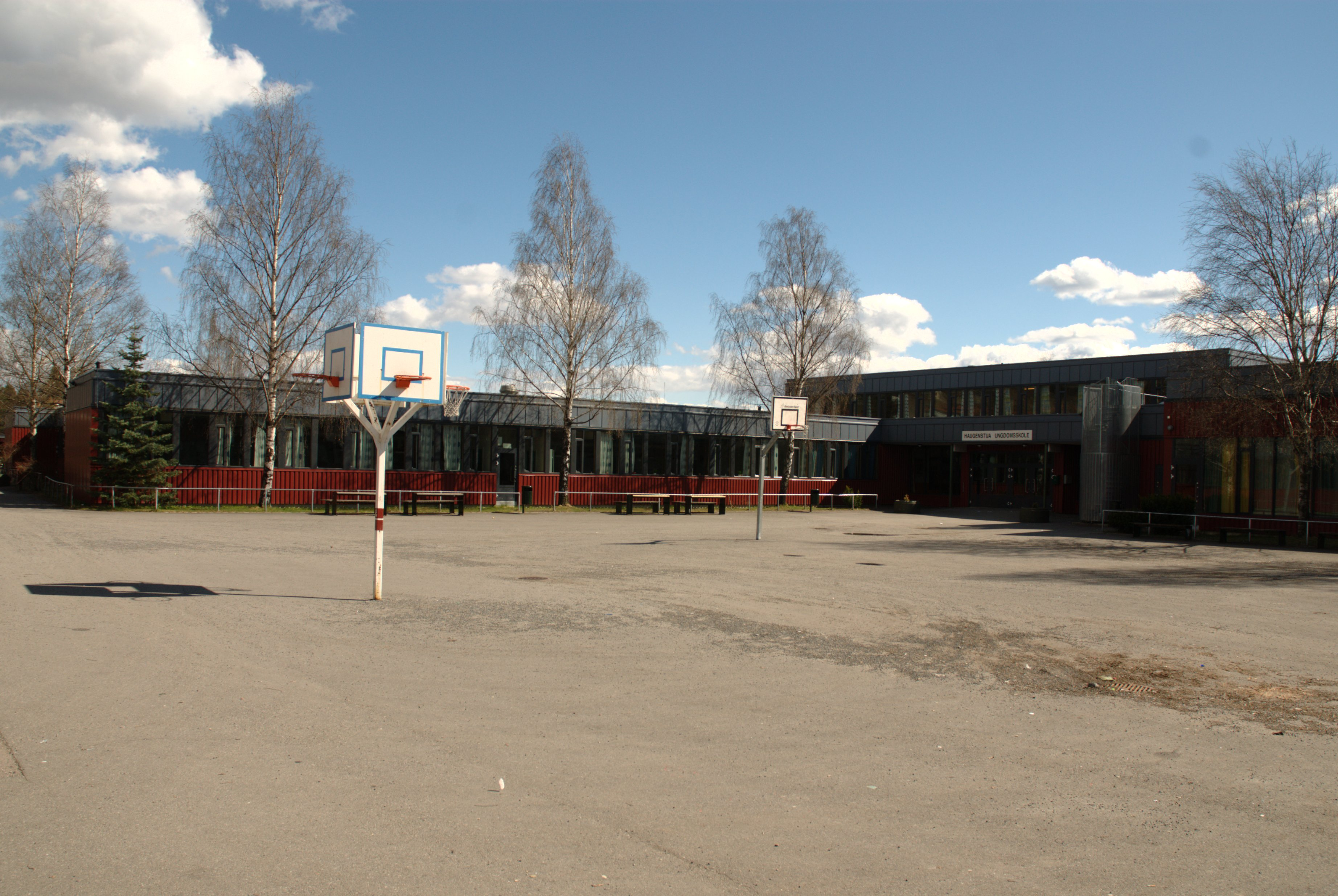 Haugenstua skole er en ungdomsskole i Stovner bydel, Oslo, bygget i 1972.